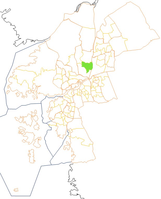 Karta som visar primärområdes belägenhet i Göteborg